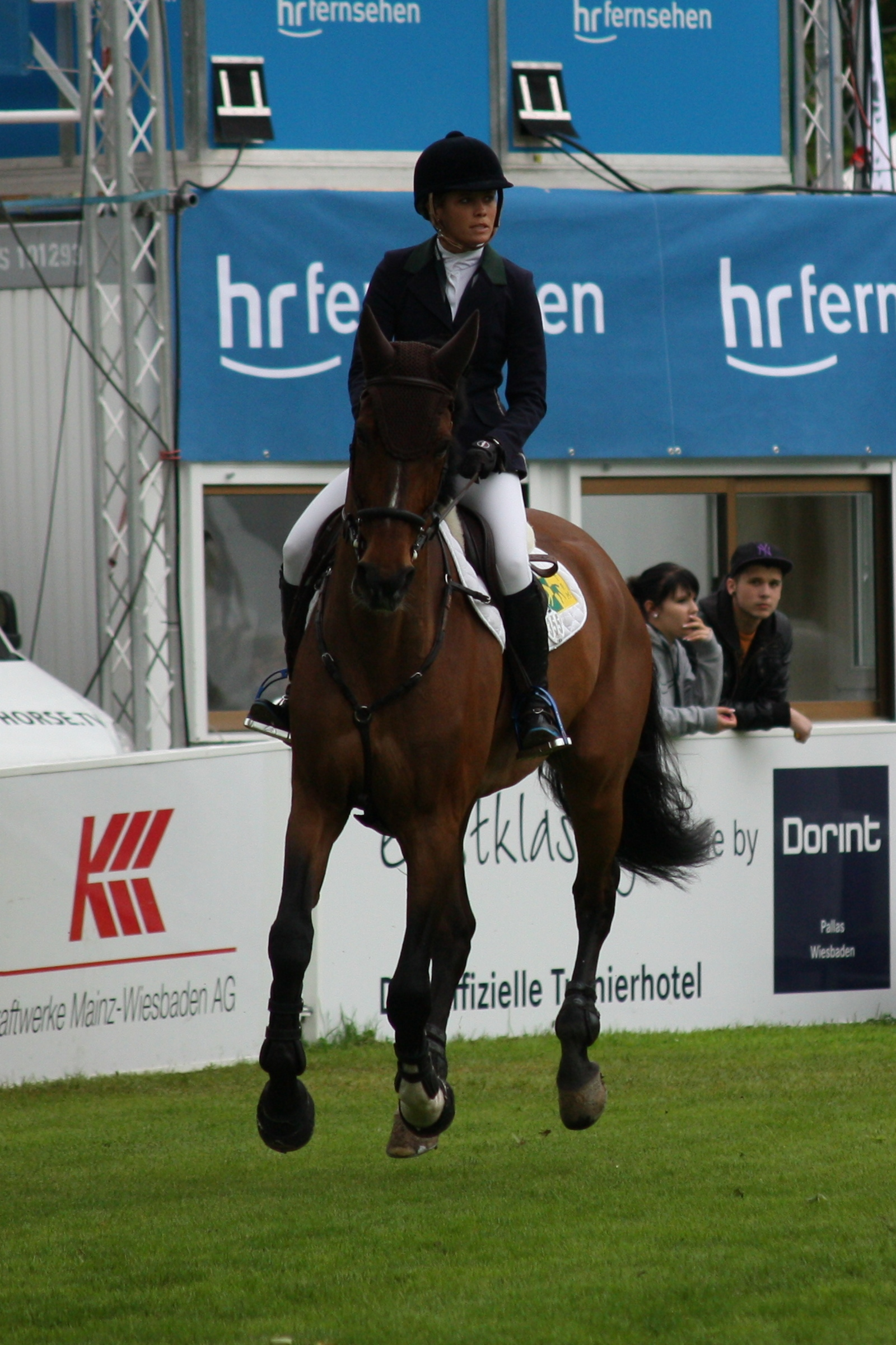 77. Internationanles Wiesbadener Pfingstunier 2013, CSI***** Eröffnungsspringen, Julia Hargreave auf Vedor Personality rights warningAlthough this work is freely licensed or in the public domain, the person(s) shown may have rights that legally restrict certain re-uses unless those depicted consent to such uses. In these cases, a model release or other evidence of consent could protect you from infringement claims.